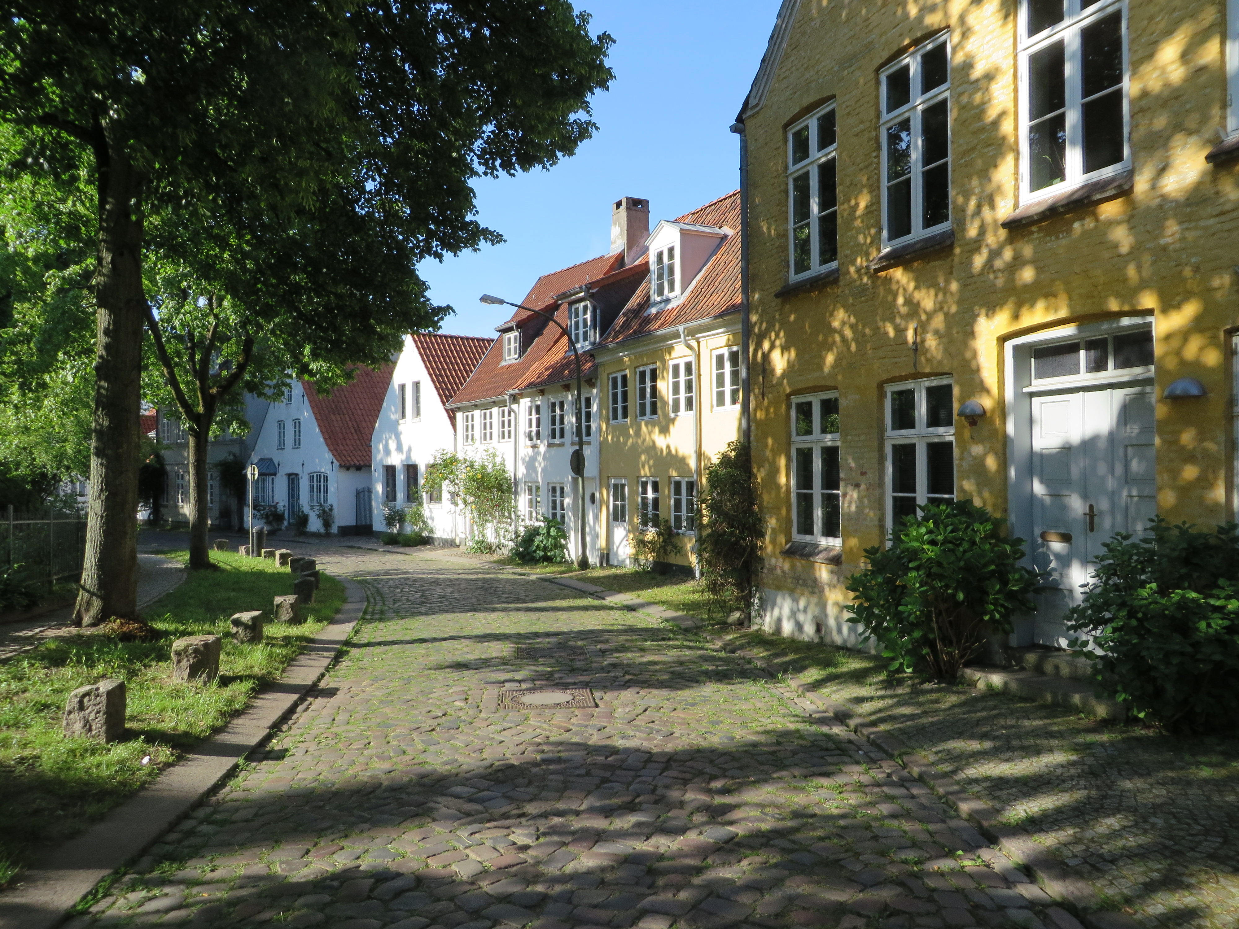 Johanniskirchhof (Johannisviertel Flensburg Mai 2014), Bild 02